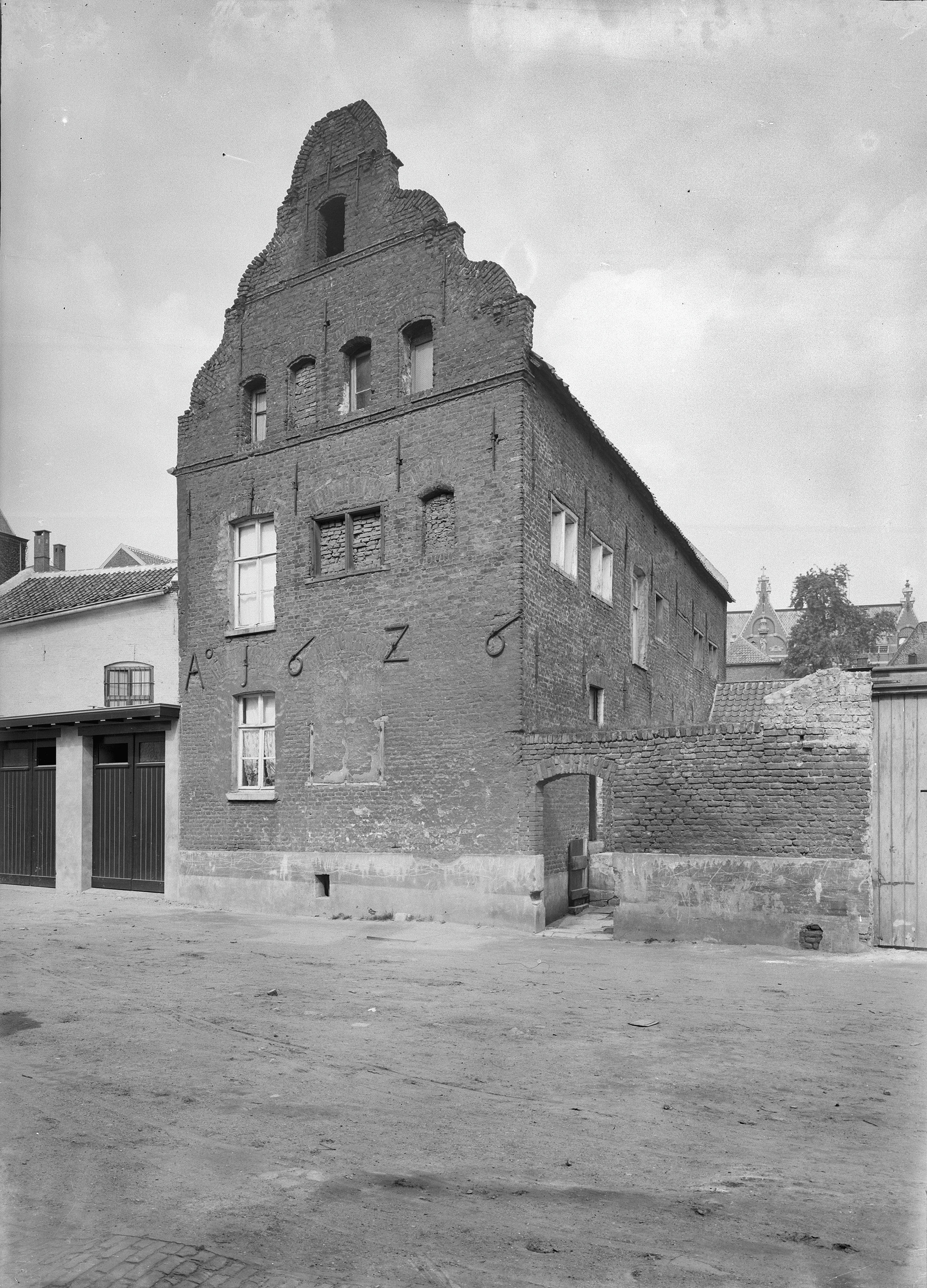 Potloofstraat, gevel Armenhuis This is a possible Rijksmonument: Find the monument in the Monuments database: in Venlo All Rijksmonumenten in Venlo Is this a Rijksmonument? Yes No More information about this project and help. More images to work at in Category:Possible Rijksmonumenten.